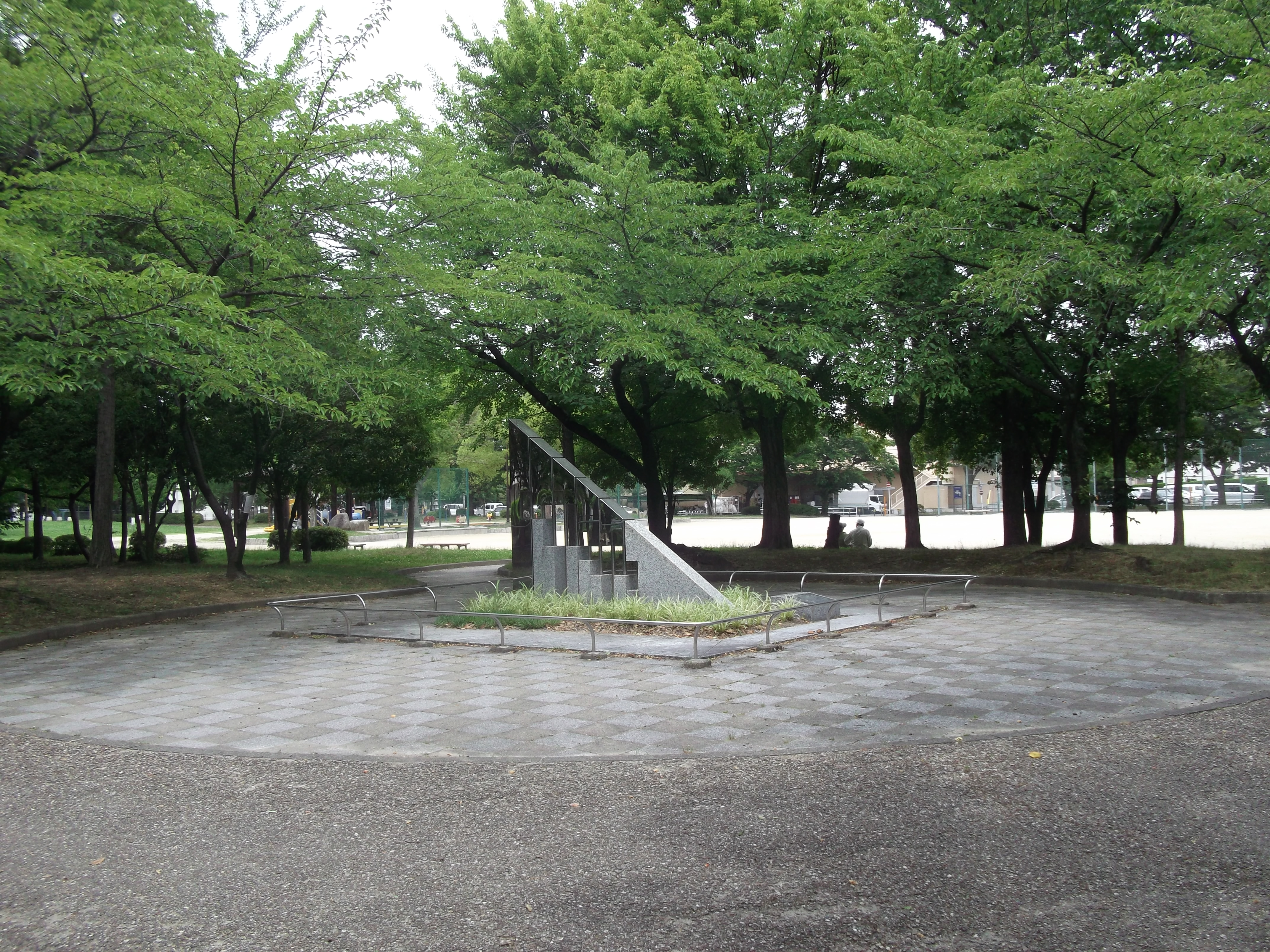 名古屋市守山区村合町にある山下公園を南西角から写す